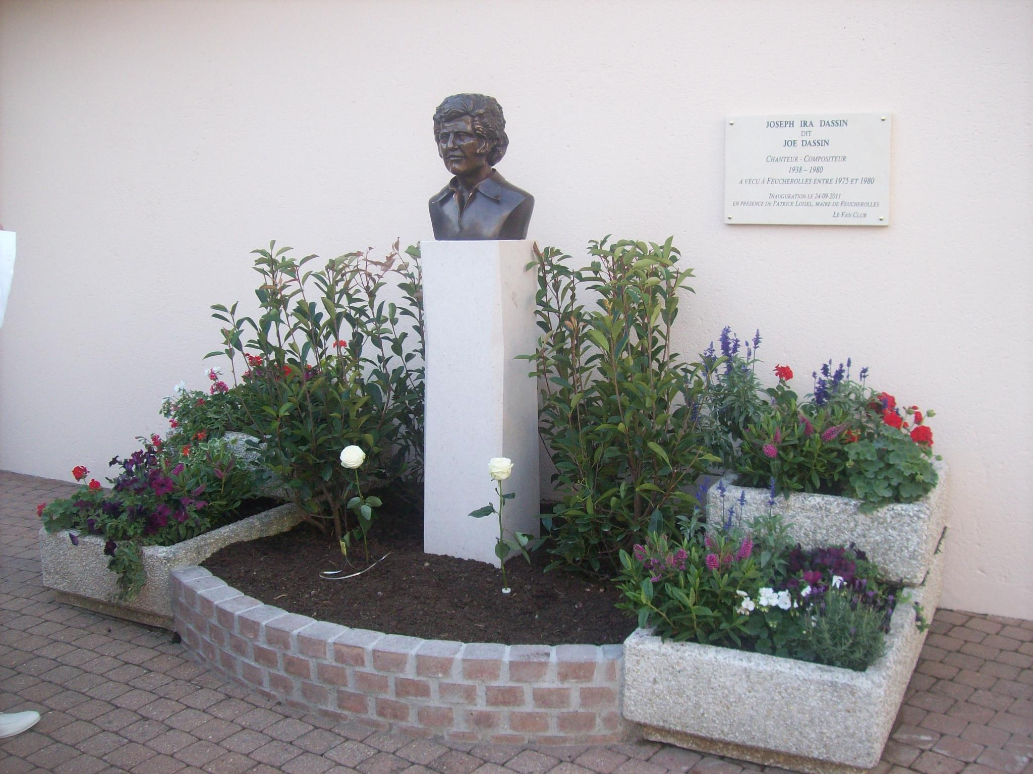 Buste en bronze à l'éffigie de Joe Dassin